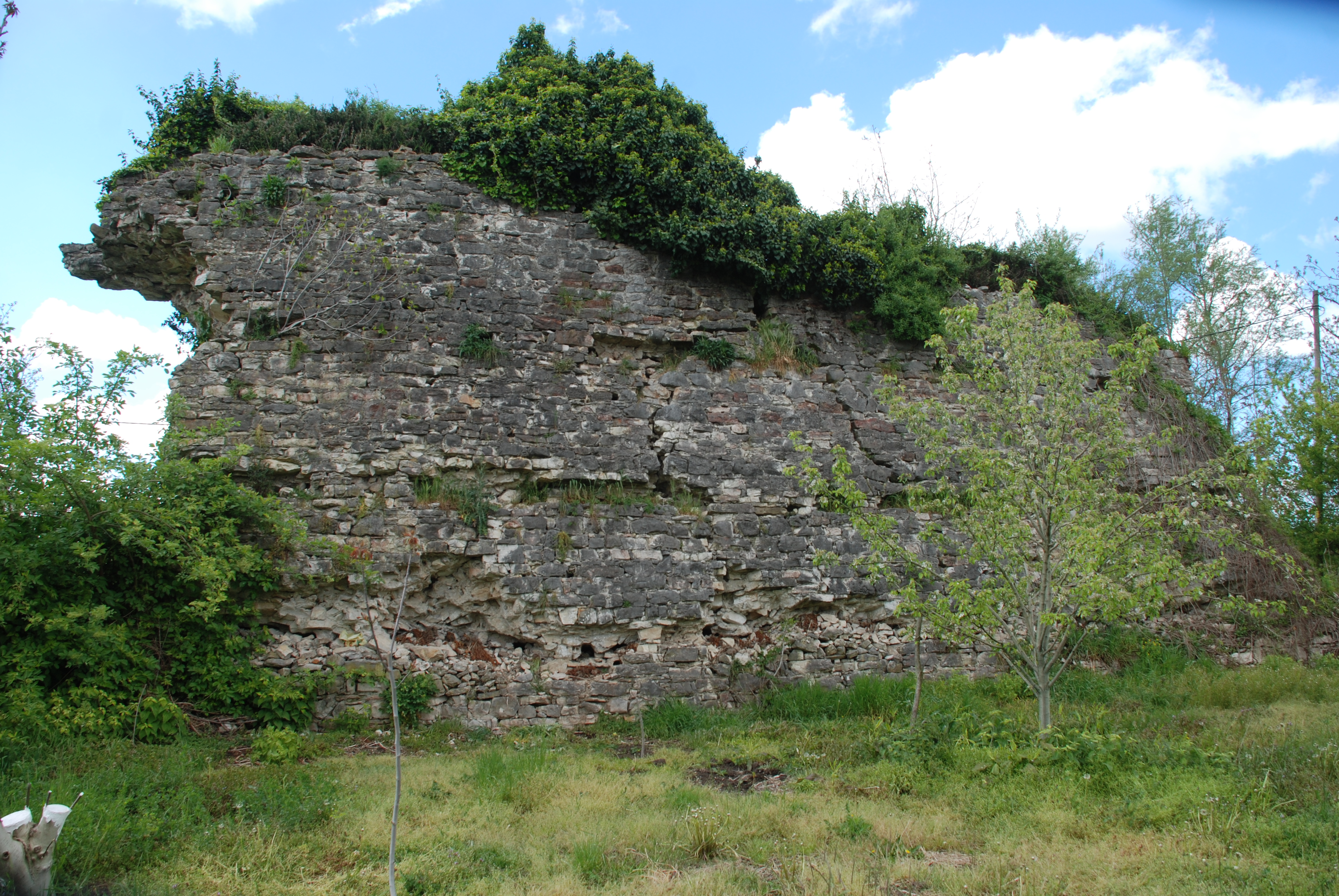 12 yy, Bizans dönemine ait kale kalıntısı.Seyifler Köyü, Ferizli, Sakarya.